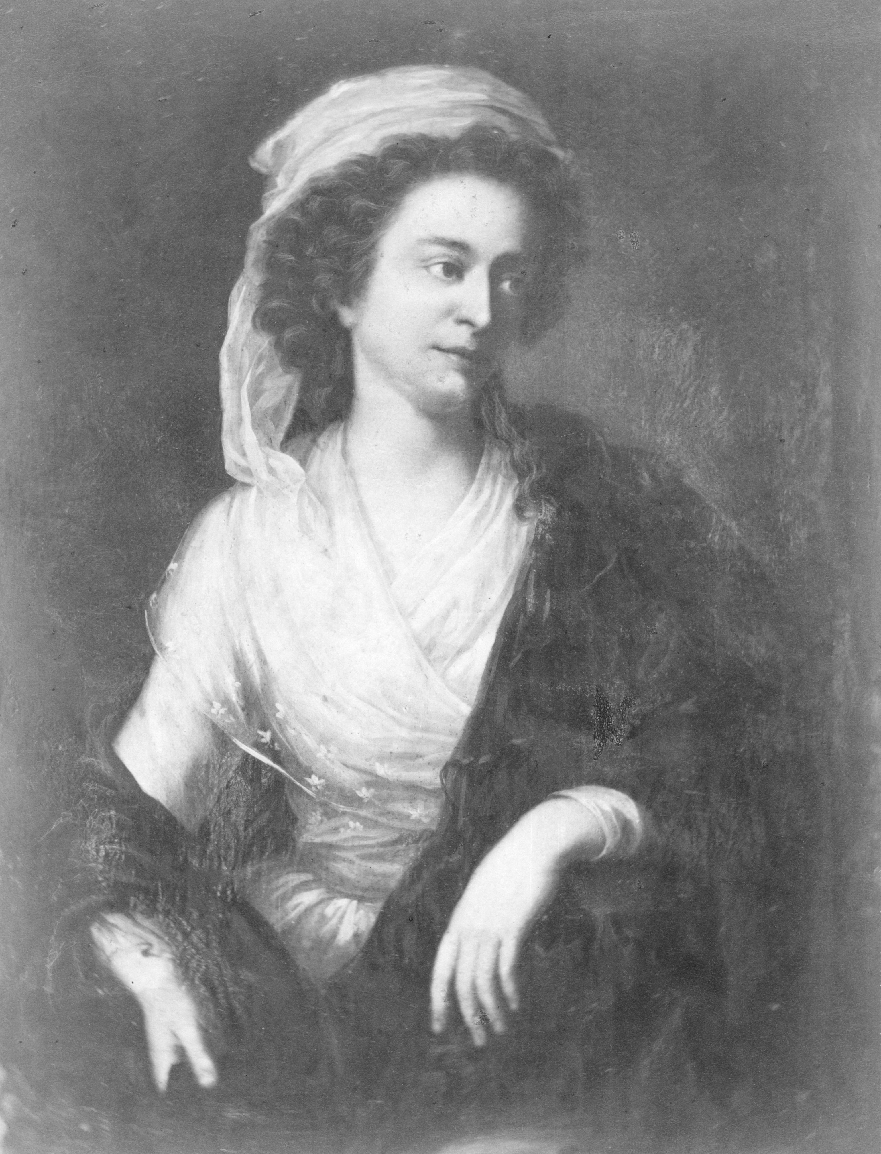 Zofia Potocka